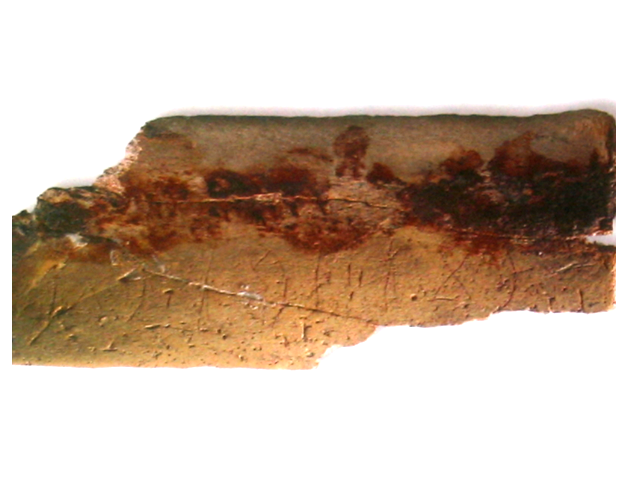 Steppean rovas inscription of Homokmégy-Halom (Hungary). Middle of the 900s. A homokmégy-halomi rovásírásos felirat. 900-as évek közepe.